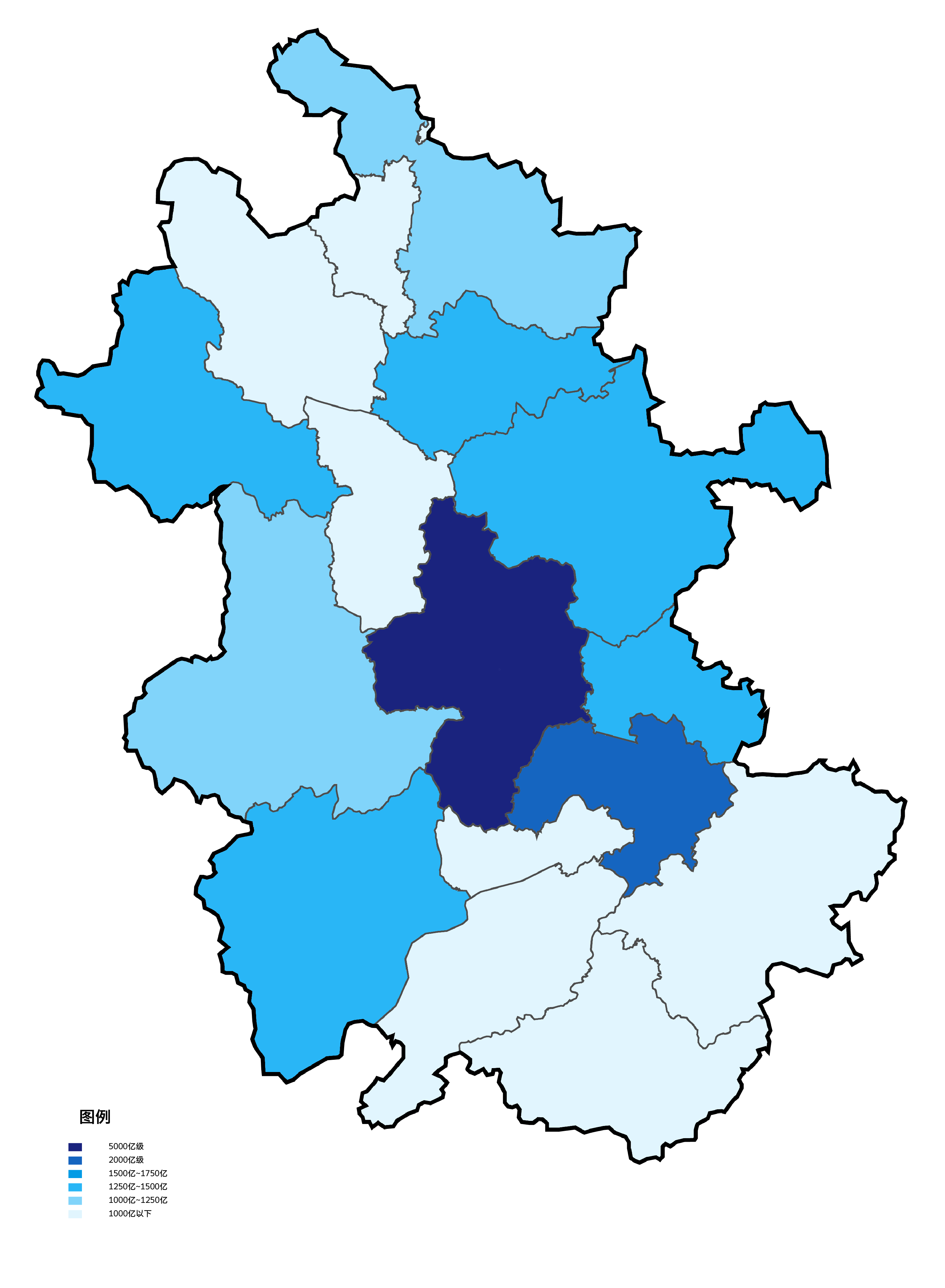 安徽省各地级市根据2015年地区生产总值填色地图